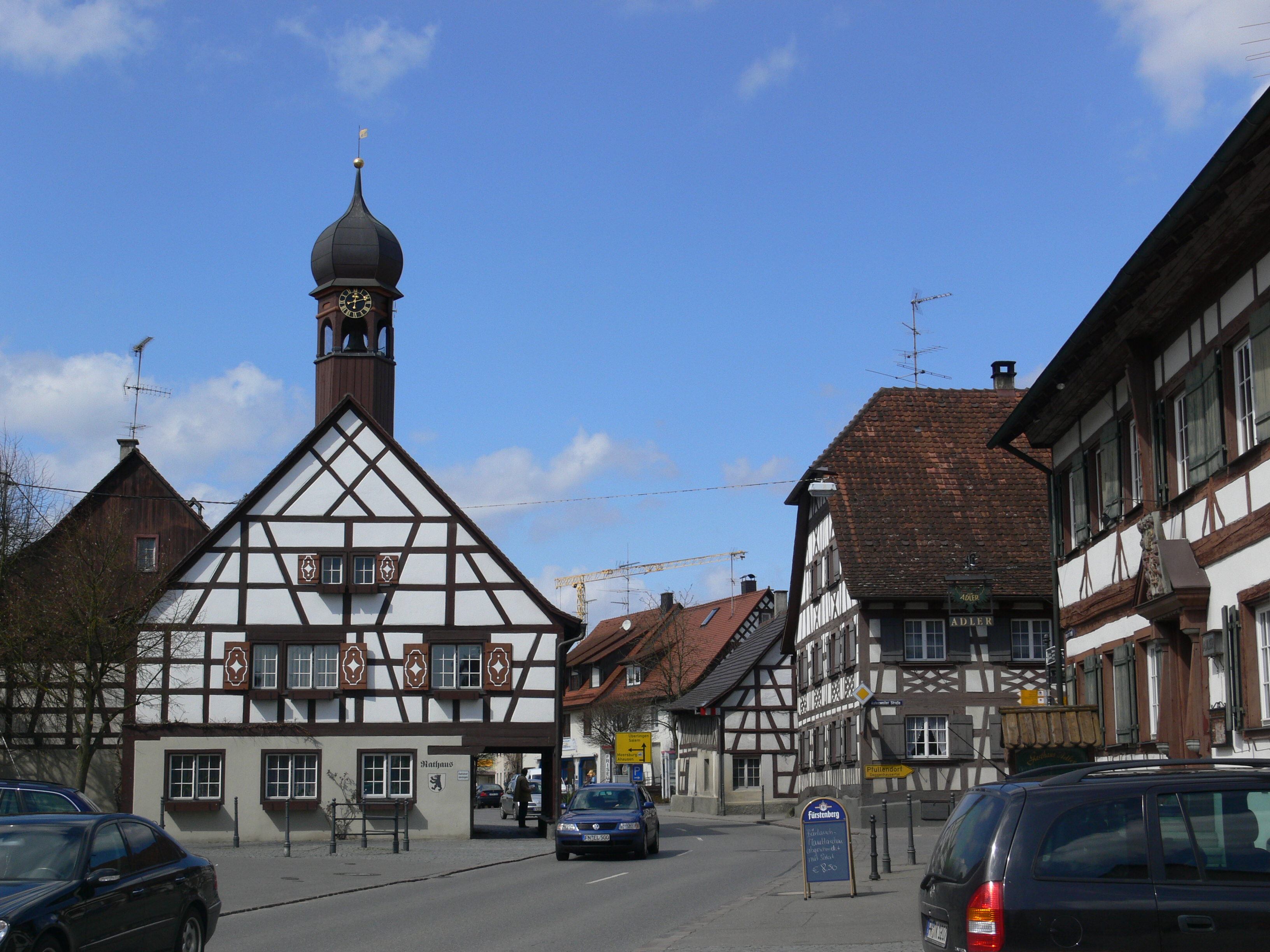 Bermatingen, Bodenseekreis: Das Rathaus und andere Fachwerkhäuser